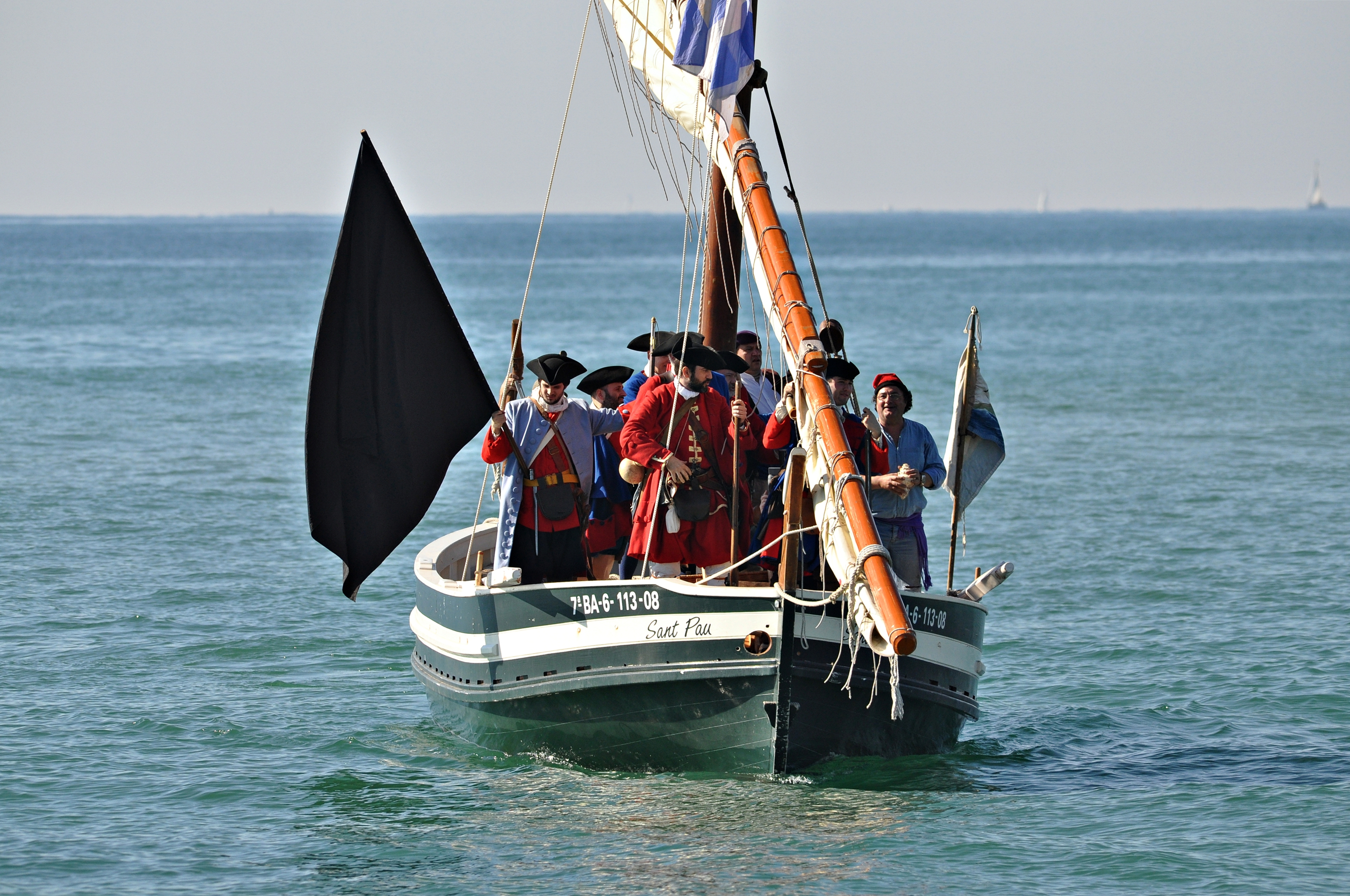 desembarco de los miquelets en arenys